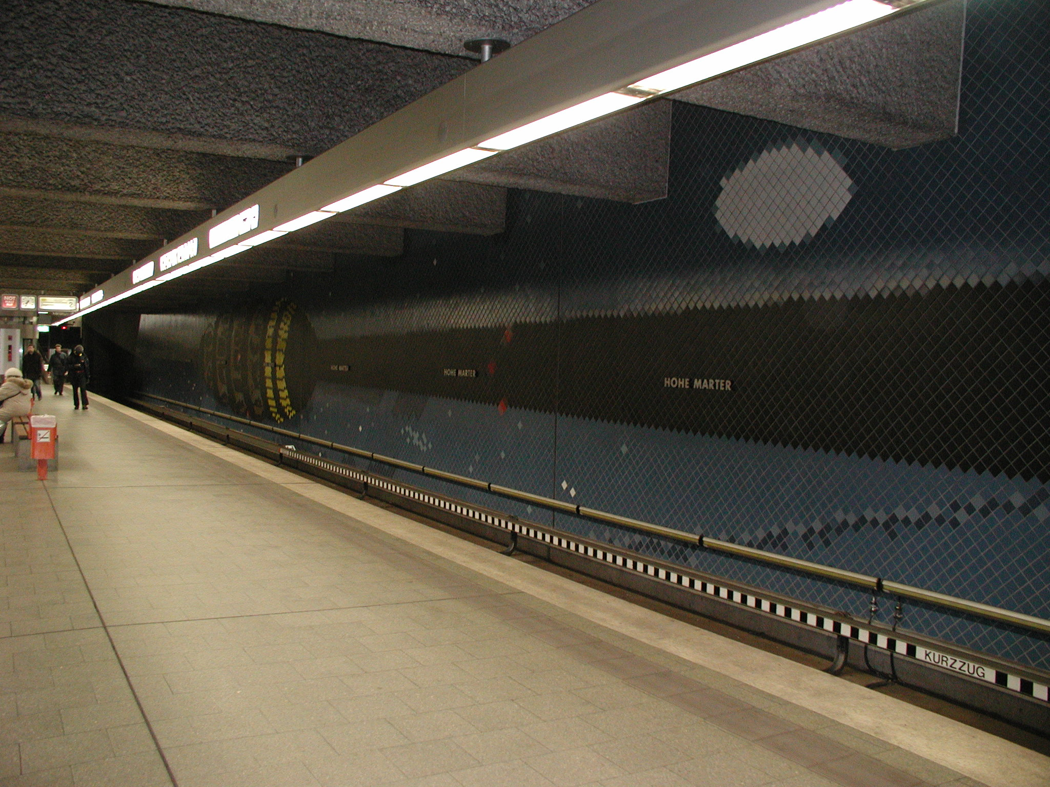 U-Bahnhof Nürnberg Hohe Marter